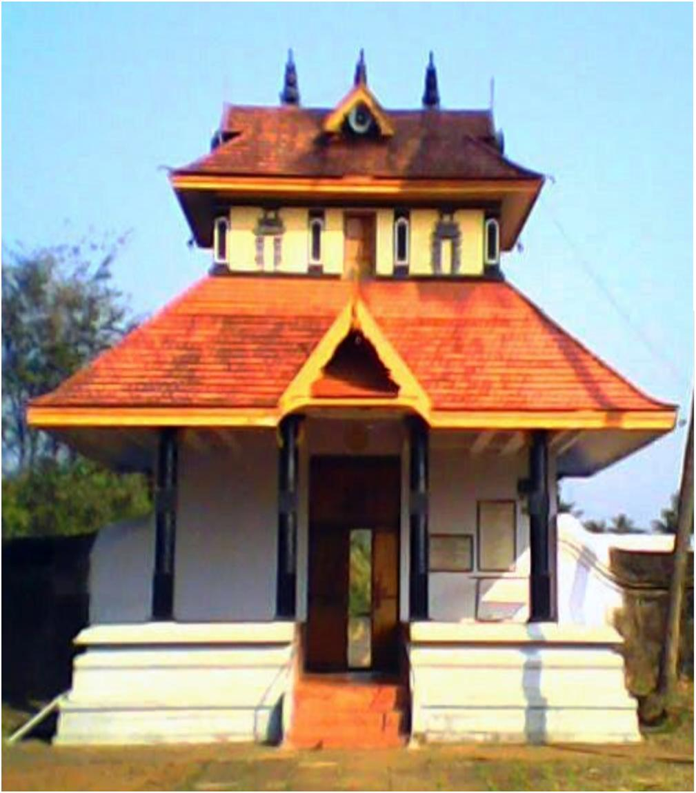 വെങ്ങനല്ലൂർ തിരുവിമ്പിലപ്പൻ ക്ഷേത്ര ഗോപുരം